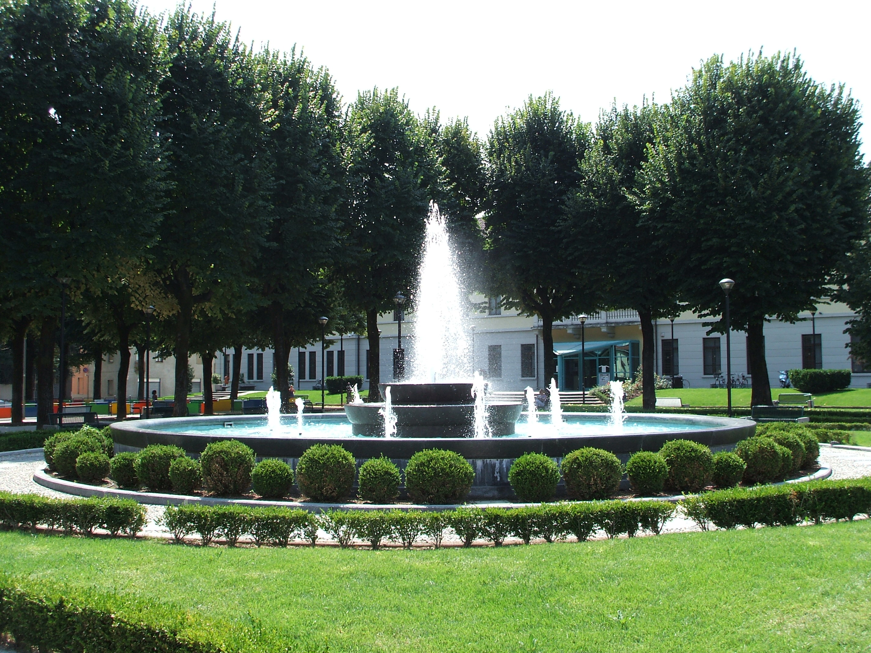 Fontana a zampilli con giochi di colore progettata da Ambrogio Fossati, situata a Lissone (MB) in Piazza IV Novembre